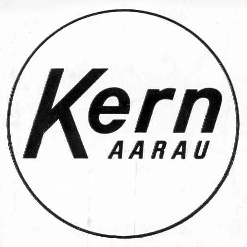 Logo von Kern & Co. AG, Aarau ab 1920